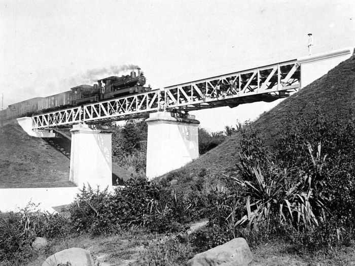 Repronegatief. Een stoomtrein rijdt op een spoorbrug over de rivier Tjodie bij Jogjakarta op de lijn van de Nederlandsch-Indische Spoorweg Maatschappij tussen Semarang en de Vorstenlanden, Midden-Java